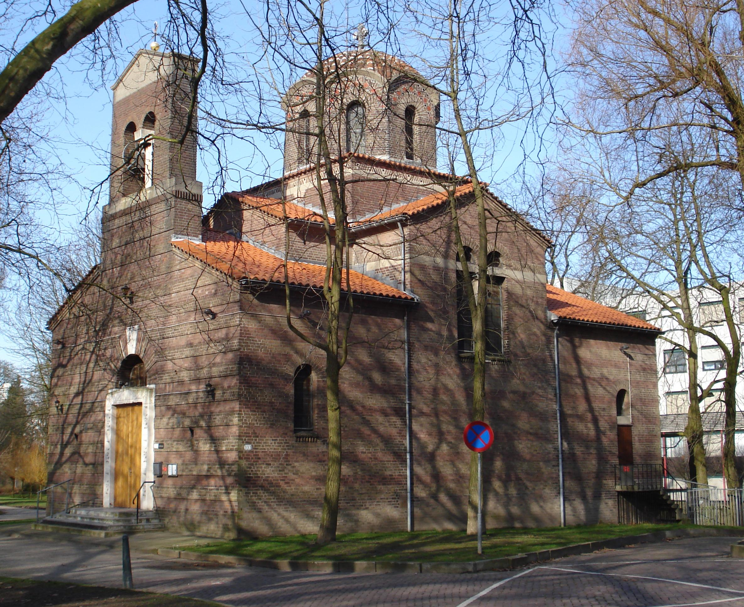 Rotterdam, Westzeedijk. Grieks-Orthodoxe kerk.